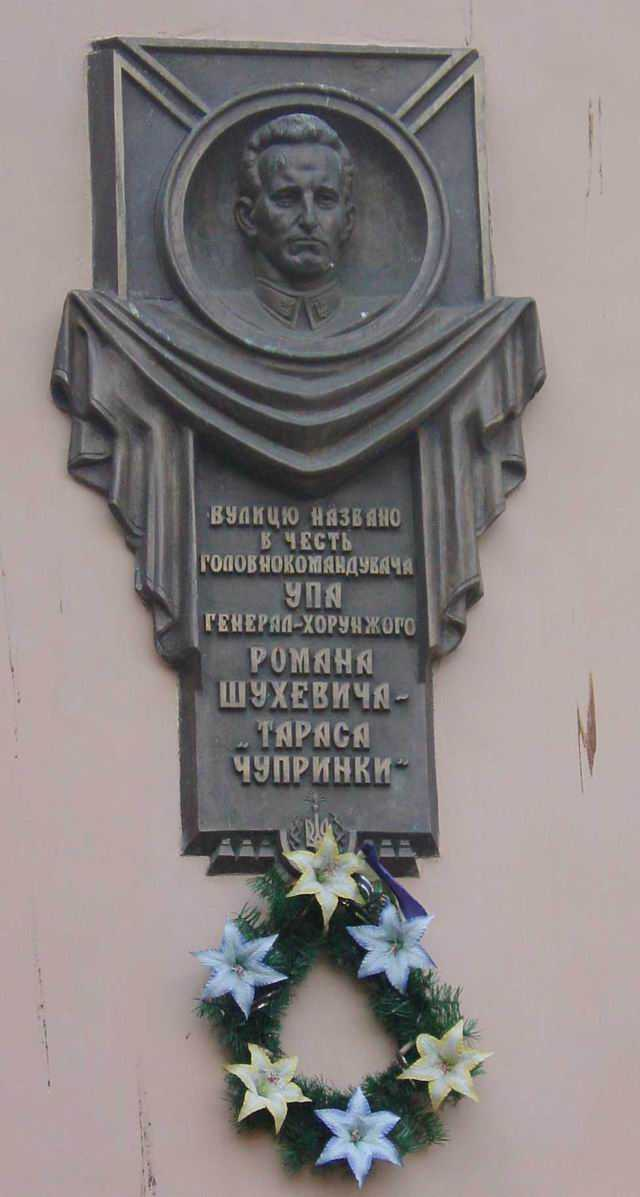 Tablica pamiątkowa Romana Szuchewycza na fasadzie polskiej szkoły we Lwowie. Foto: Stanisław Kosiedowski we wrześniu 2003.